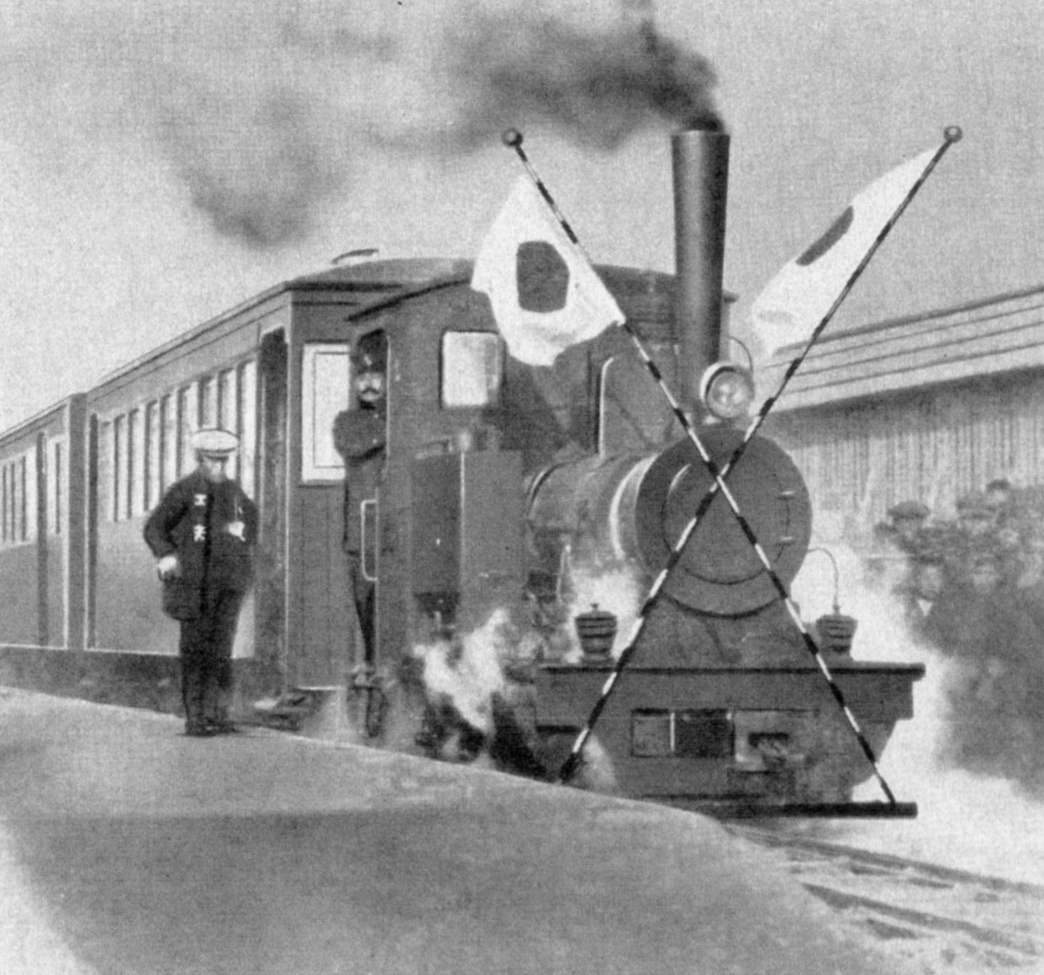 東濃鉄道線の開業広見・御嵩間を軽便鉄道で開業した大正9年8月の写真